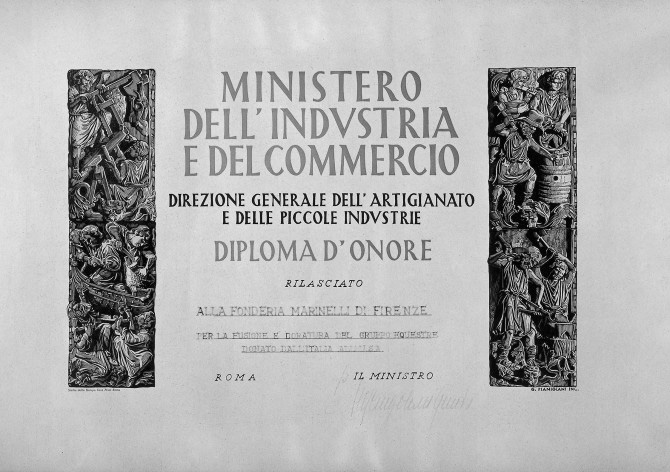 Diploma rilasciato alla Fonderia Artistica Ferdinando Marinelli per la fusione del Monumento 'Sacrifice' di Leo Friedlander posto all'Arlington Memorial Bridge di Washington